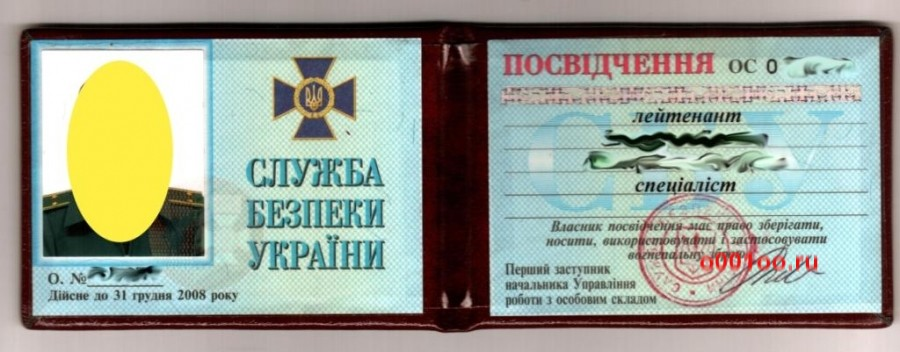 Службове посвідчення СБУ 2004-2008 рр .